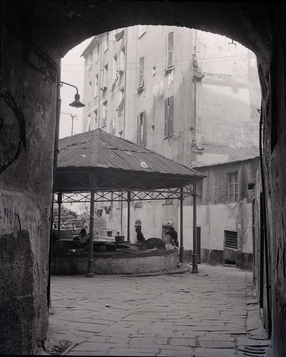 Genova, sestiere del Molo, gli scomparsi lavatoi di piazza delle Lavandaie Serie fotografica : Venezia, 1975 / Paolo Monti. - Buste: 4, Fototipi: 4 : Negativo b/n, gelatina bromuro d'argento/ pellicola ; 6x6. - ((Serie costituita da 4 negativi identificati con i nn.: R11518-11521. Numerazione parallela: 63, 67, 84, 90. Sulla busta R11518 manoscritto: "Venezia". La suddetta serie è contenuta nella scatola identificata con la numerazione R11270/11576. Sul coperchio iscrizione manoscritta a pennarello: "Località varie n.3". Confronta con la serie R08911-8917 identificata con Genova.